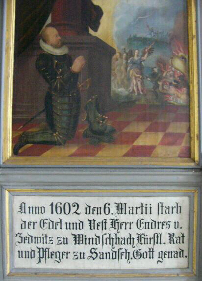 Epitaph des "Endres v. Zedwitz zu Windschbach" in der evangelischen Kirche von Absberg. Die Inschrift besagt: Anno 1602 den 6. Martii starb der Edel und Vest Herr Endres v. Zedwitz zu Windschbach Fürstl. Rat und Pfleger zu Sandsch. Gott genad.